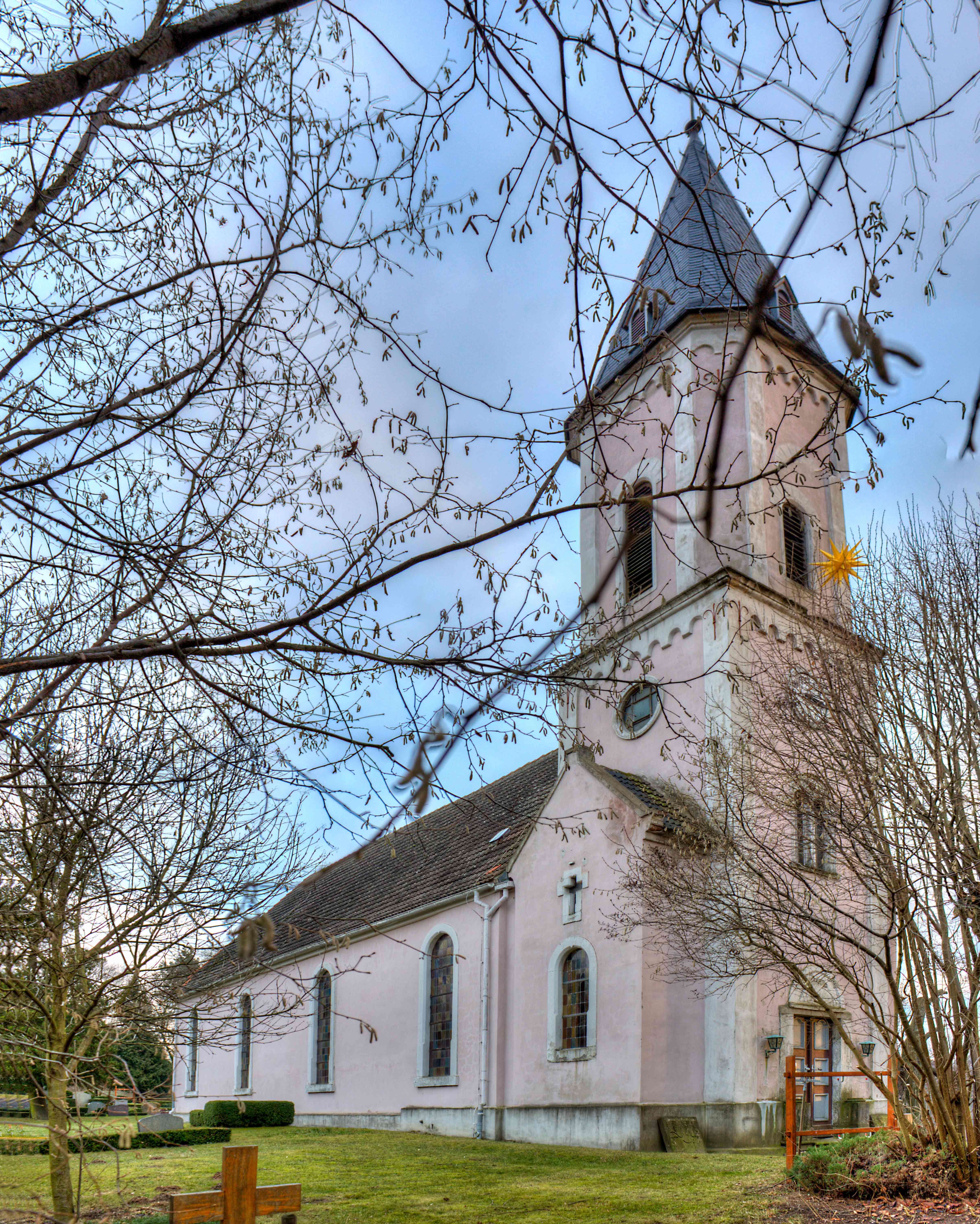 Kirche, Straße der Einheit in Cavertitz OT Bucha